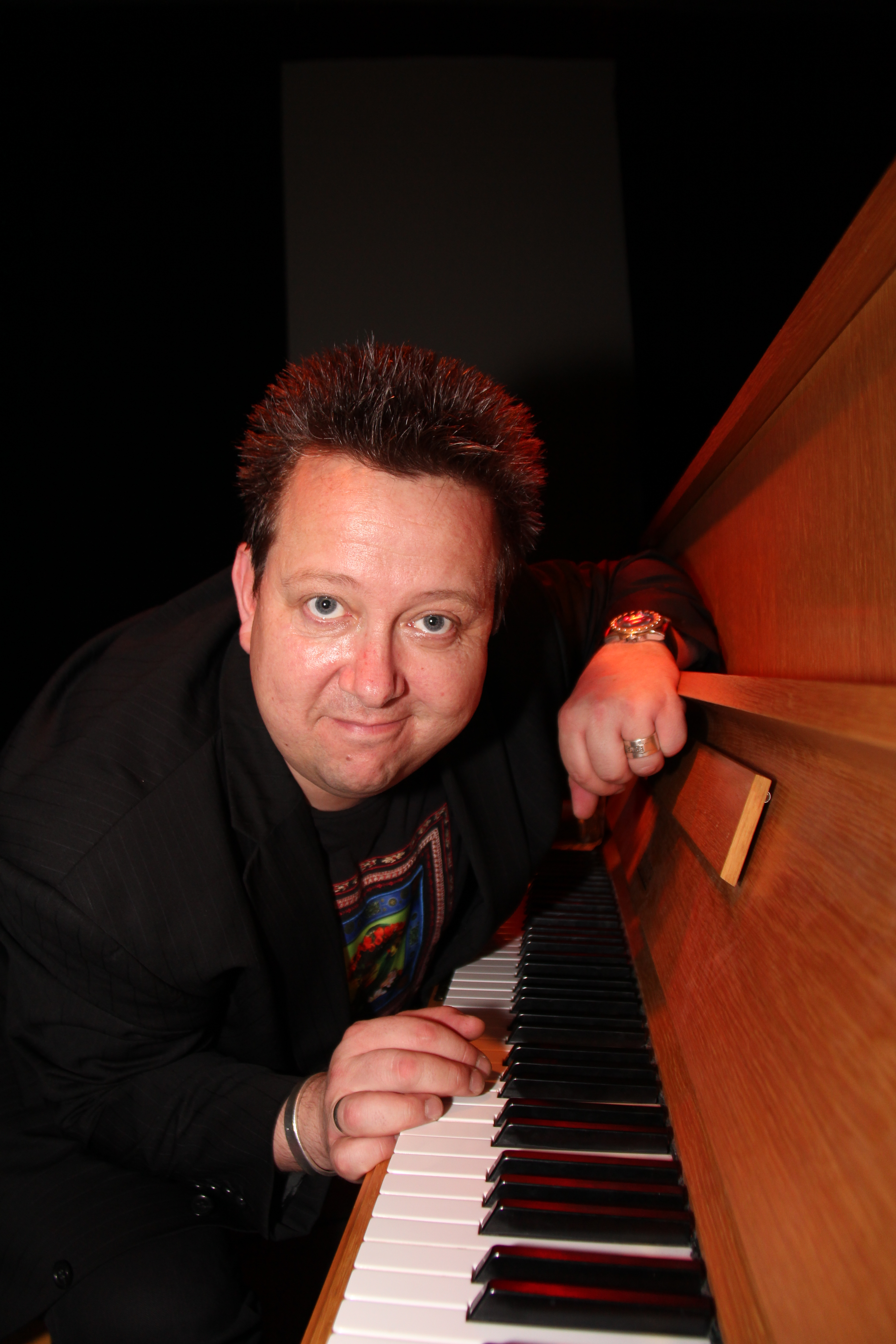 Sänger und Musiker Sebastian Krumbiegel nach der Finalvorstellung seiner Tour Solo am Piano in der Kulturfabrik in Hoyerswerda